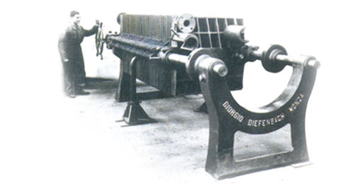 Filtropressa Diefenbach a trave laterale. Anno 1907.